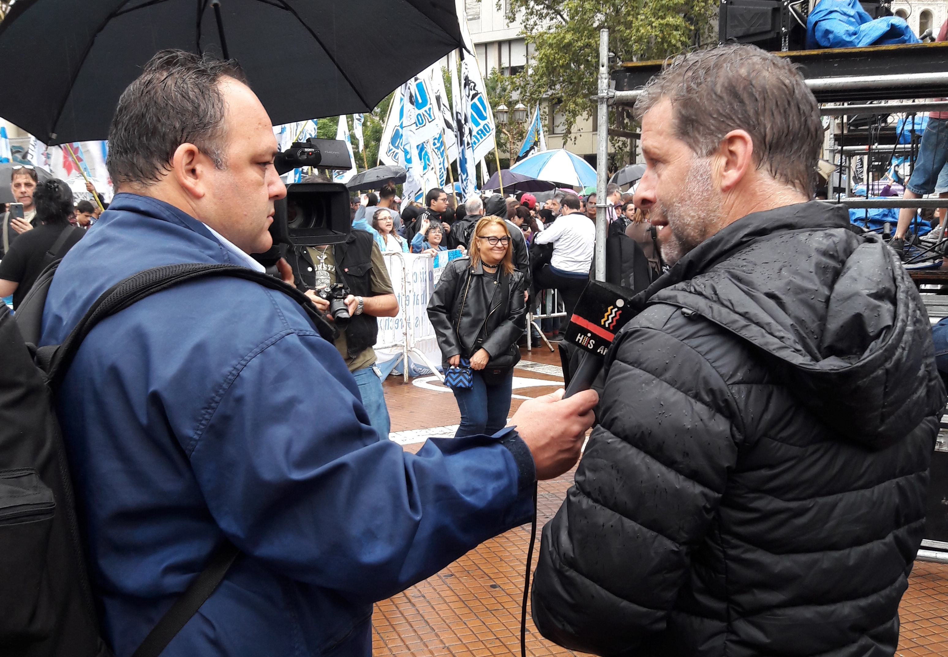 Acto del Día del Veterano y de los Caídos en la Guerra de Malvinas realizado el 2 de abril de 2017 en Plaza de Mayo, Buenos Aires. Participaron ex combatientes, militantes kirchneristas, demás peronistas y de izquierda.